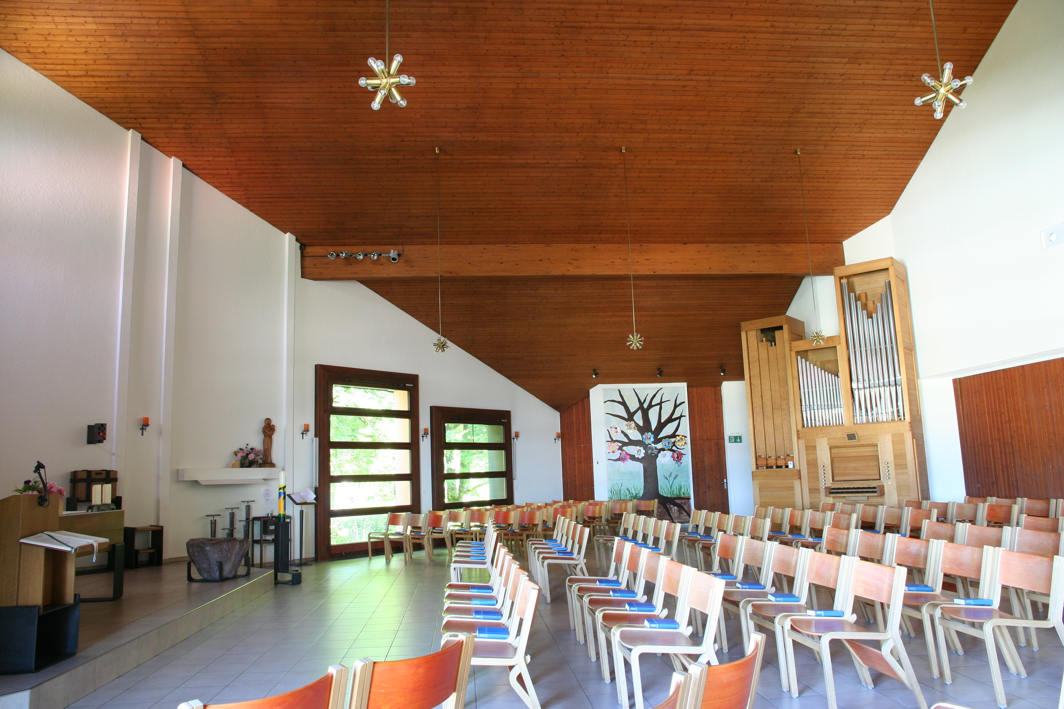 Römisch-katholische Pfarrkirche Herz Jesu Hausen am Albis, Innenansicht